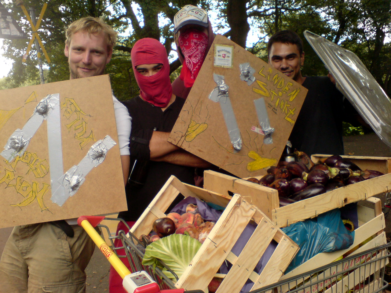 Die Gemüseschlacht in Hannover zwischen "Kämpfern" der Stadtteile Nordstadt und Linden findet auch 2012 wieder auf der Dornröschenbrücke über der Leine statt. Hier rüsten sich vier Kämpfer ...